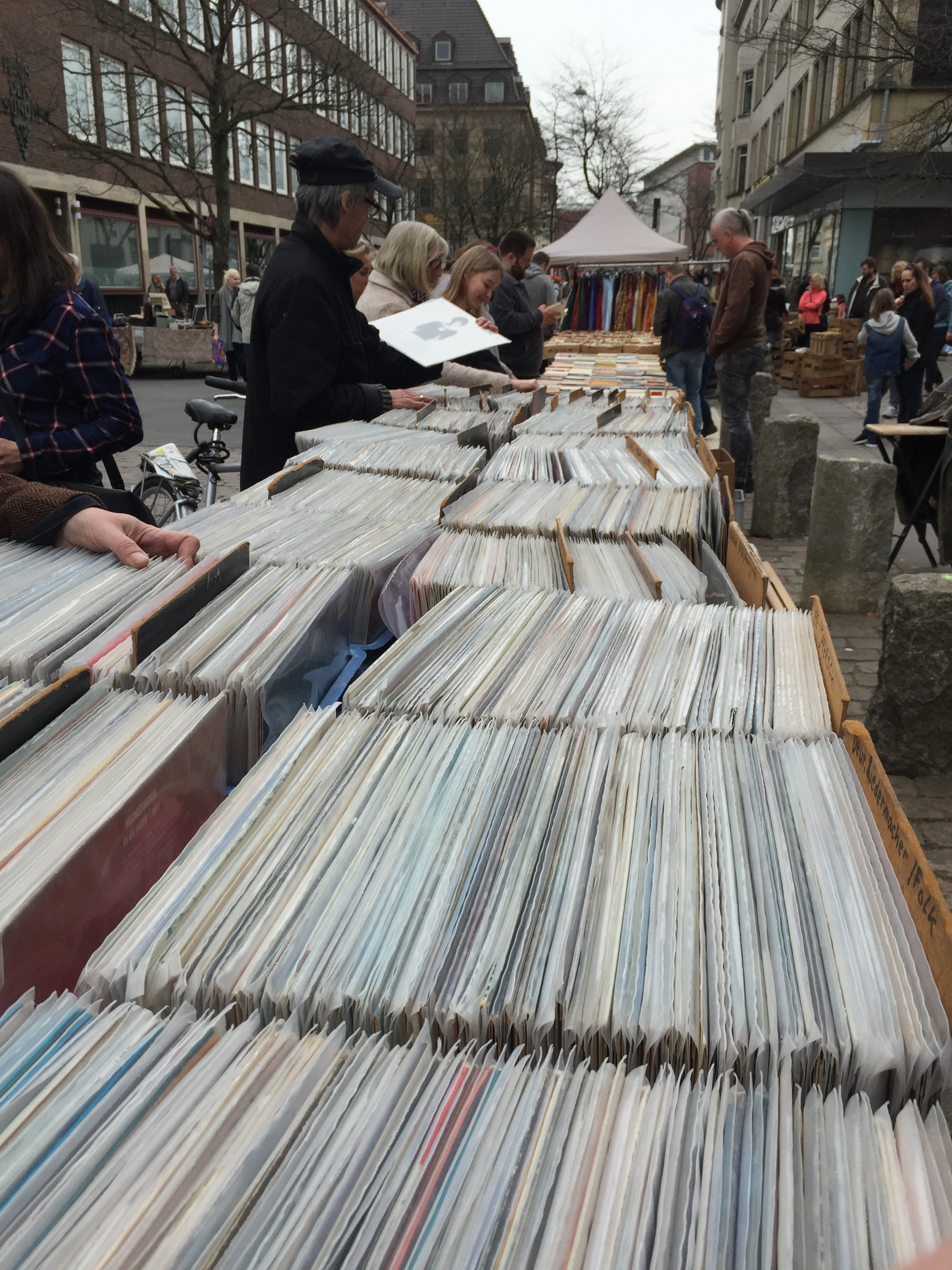 Schallplatten auf Flohmarkt